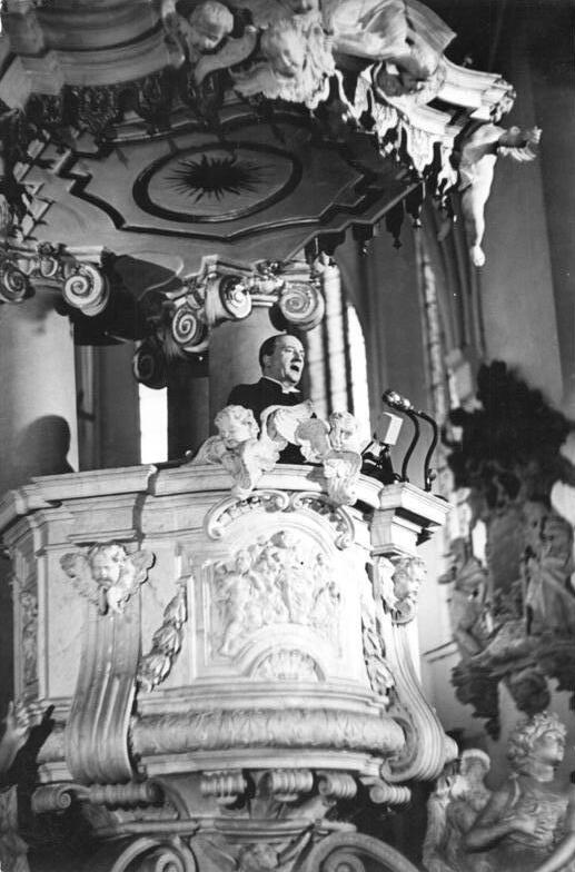 lus-Sturm Gr-Ho. 11.7.1951 III. Deutscher Evangelischer Kirchentag vom 11.- bis 15.7.1951 in Berlin UBz: Während der Eröffnungsfeier in der Marienkirche. Dr. Hans Böhm (* 5.5.1899 Hamm, + 3.4.1962 Berlin), Propst zu St. Petri und von Berlin (1945 bis 1959), hält die Eröffnungsrede.